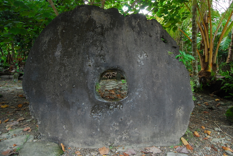 Kamienny pieniądz we wiosce na YAP 10-2007; udostępniono przez Najlepsze Nurkowania autor Bartosz Cieślak